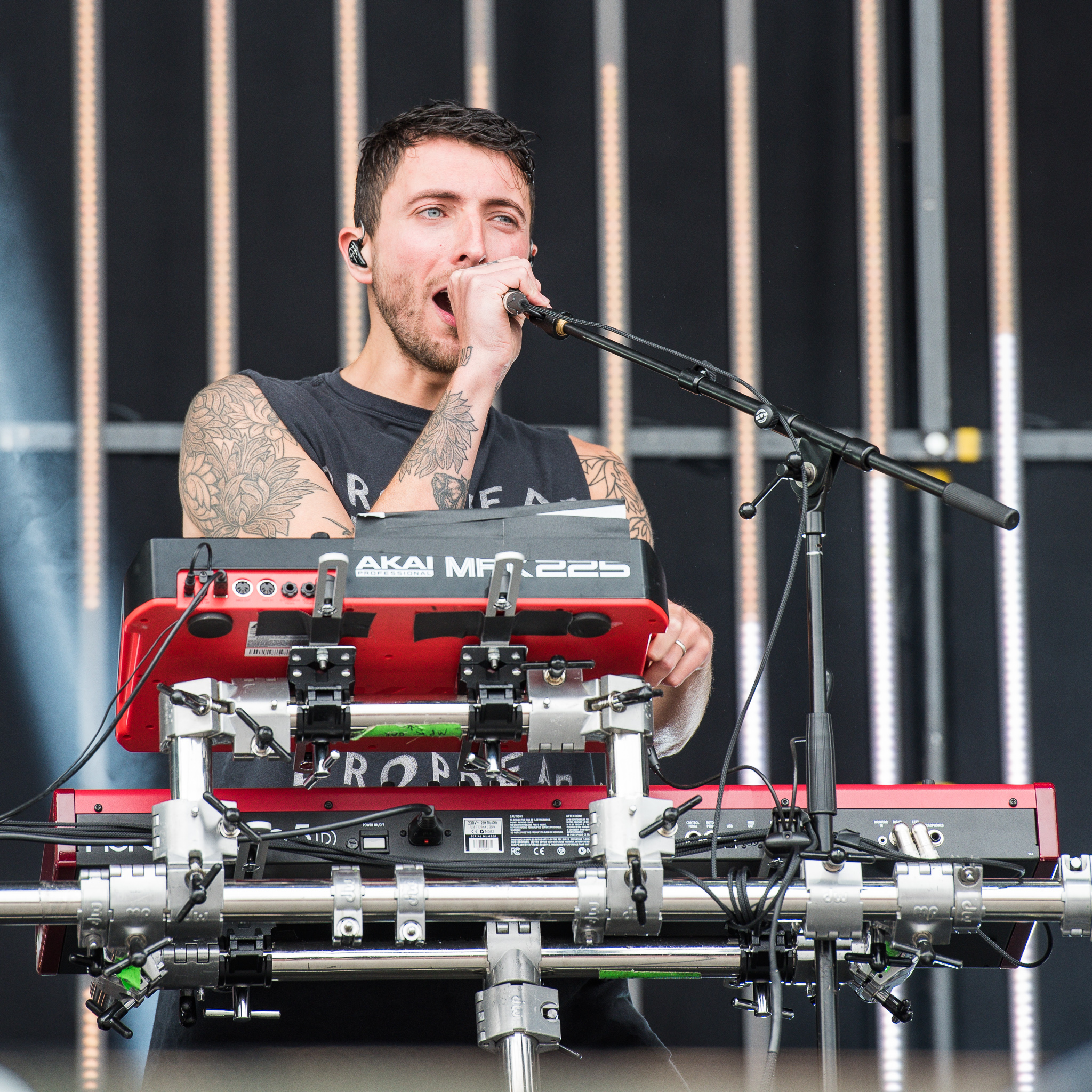 ARGO-Konzerte,Bring Me The Horizon,Festival,Jordan Fish,Konzert,Livekonzert,Livemusik,Musik,RiP,Rock im Park 2016,Seat Zeppelin Stage